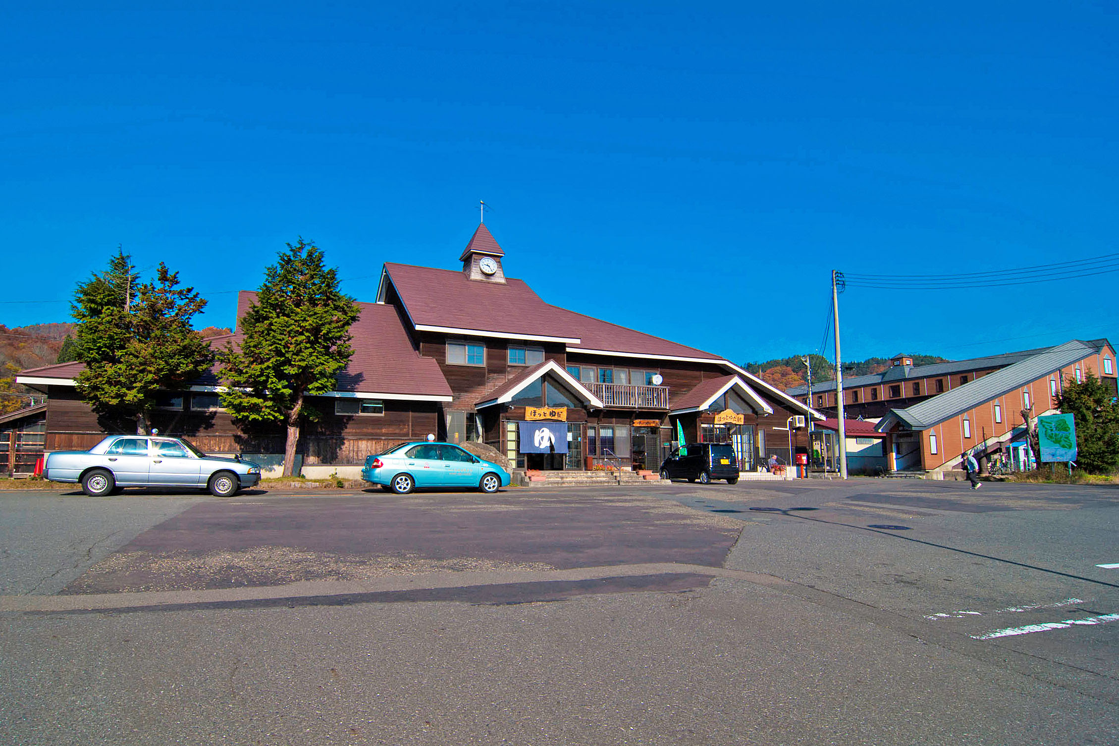 東日本旅客鉄道北上線ほっとゆだ駅